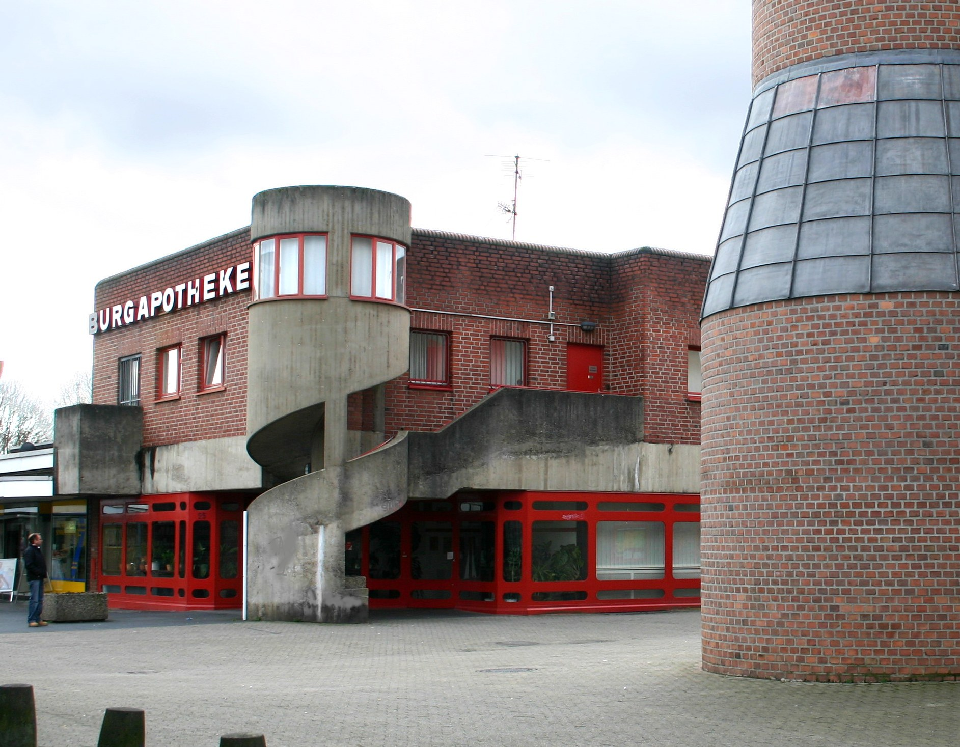 Wohn- und Geschäftshaus Ricarda-Huch-Straße in Düsseldorf-Garath. Architekt: Gottfried Böhm